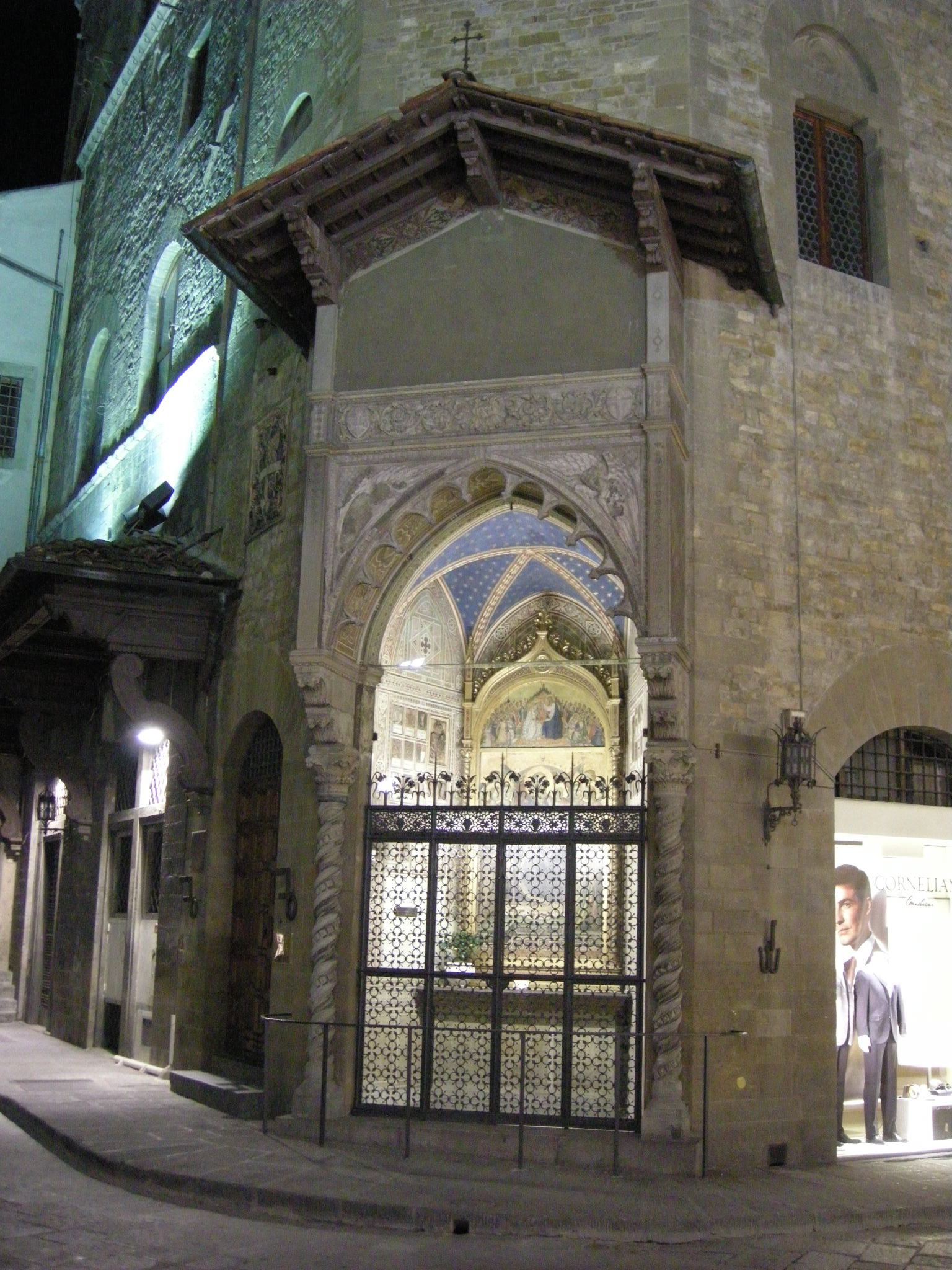 Tabernacolo di santa maria della tromba, veduta notturna